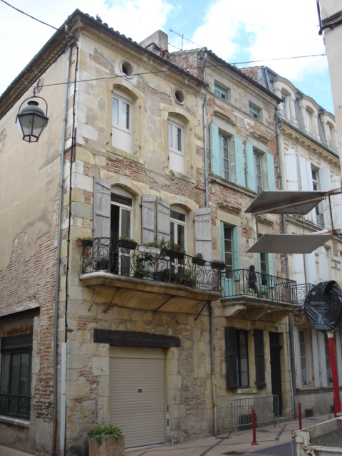 Immeuble XVIIe siècle à balcon style Régence à Villeneuve-sur-Lot